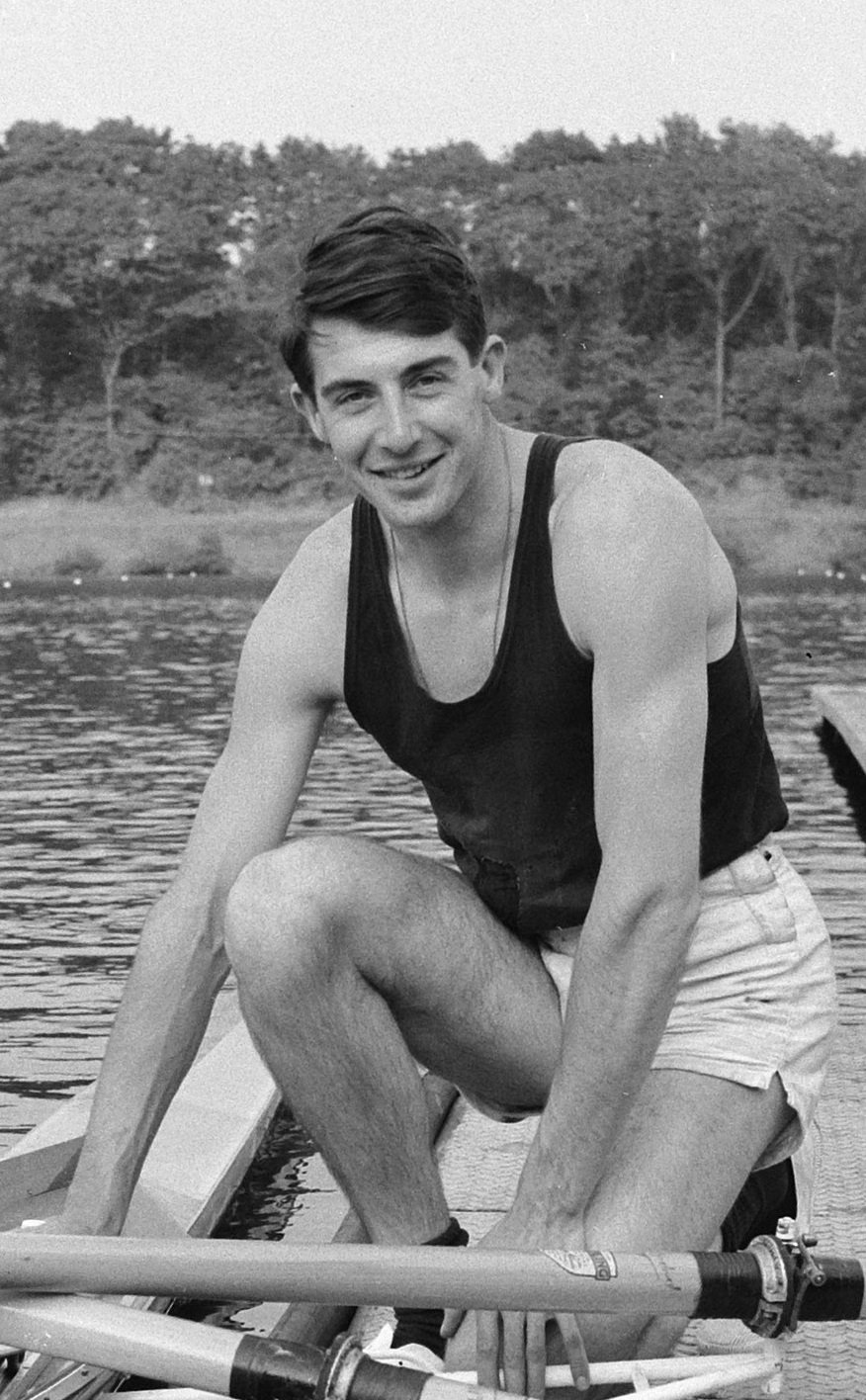 Engelse skiffeur Wordell